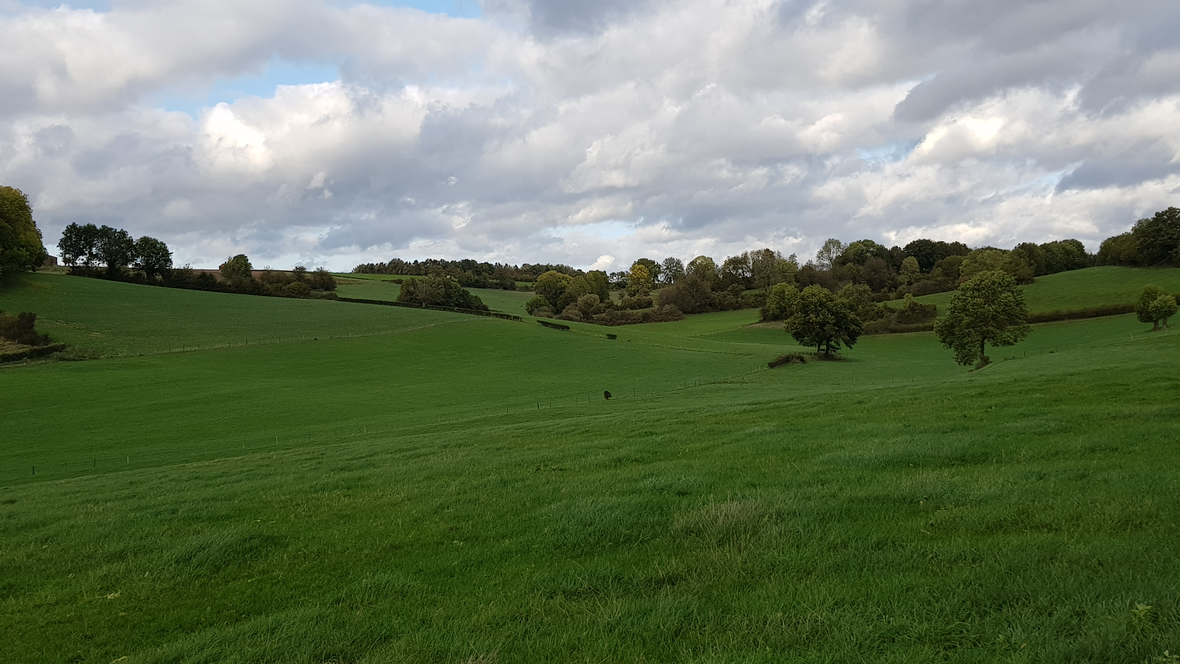 Grachterdalgrub bij Eys, Zuid-Limburg, Nederland